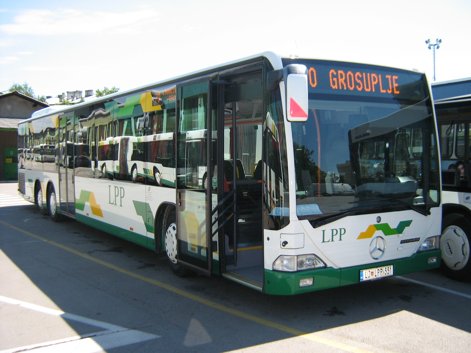 Avtobus Mercedes-Benz Citaro LÜ v lasti Ljubljanskega potniškega prometa. Avtor: Uporabnik:BurekBuster